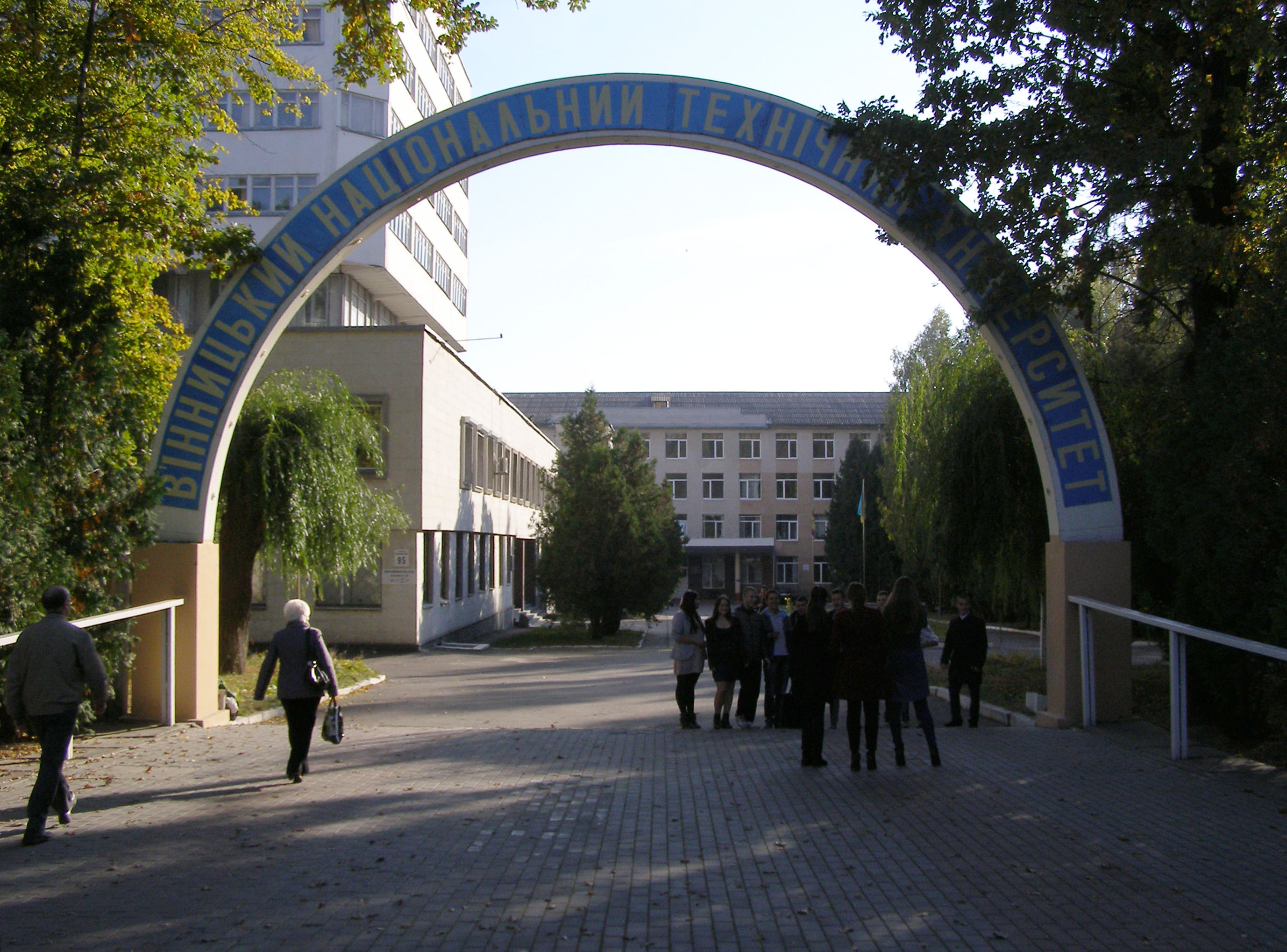 Вінниця, Хмельницьке шосе, 95. Вінницький національний технічний університет